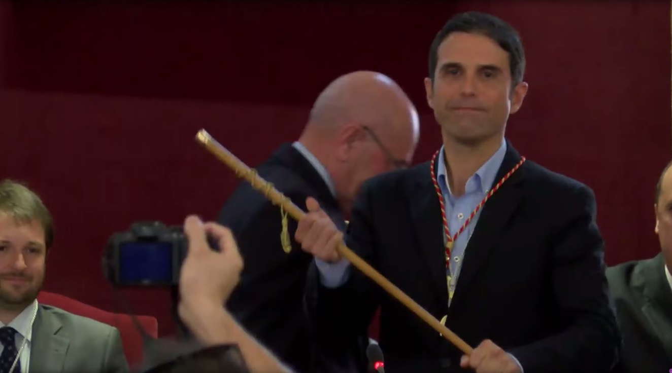 Javier Rodríguez Palacios (PSOE), recibiendo el bastón de mando de alcalde del Ayuntamiento de Alcalá de Henares el 13 de junio de 2015.